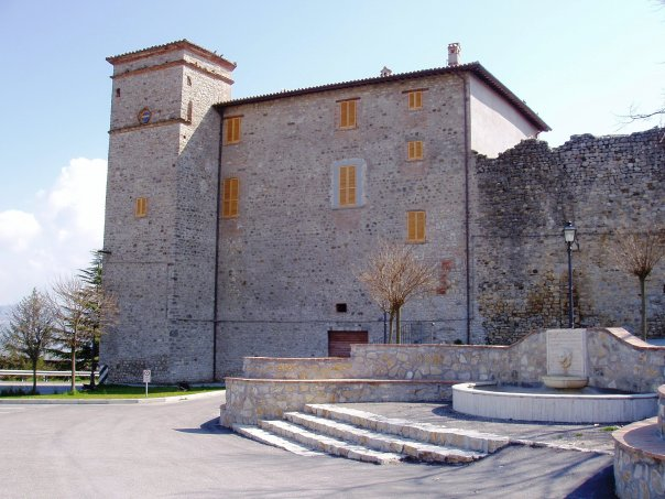 INGRESSO NORD DEL PAESE CON PALAZZO RIVELLONI